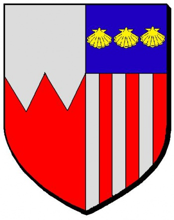 parti, au premier, coupé emanché d'argent et de gueules; au second, palé de six pièces d'argent et de gueules, au chef d'azur chargé de trois coquilles Saint-Jacques d'or.